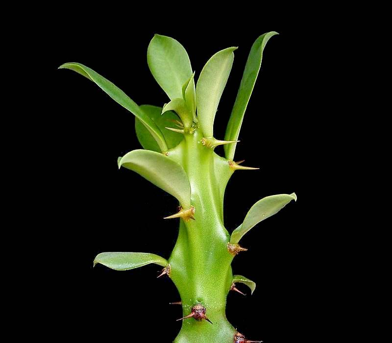 Euphorbia cattimandoo